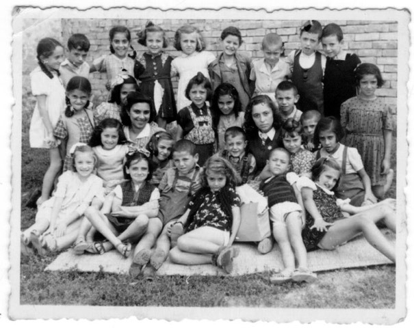 איקה קומפורטי בפלבן 1943 כגננת לילדי מגורשי סופיה